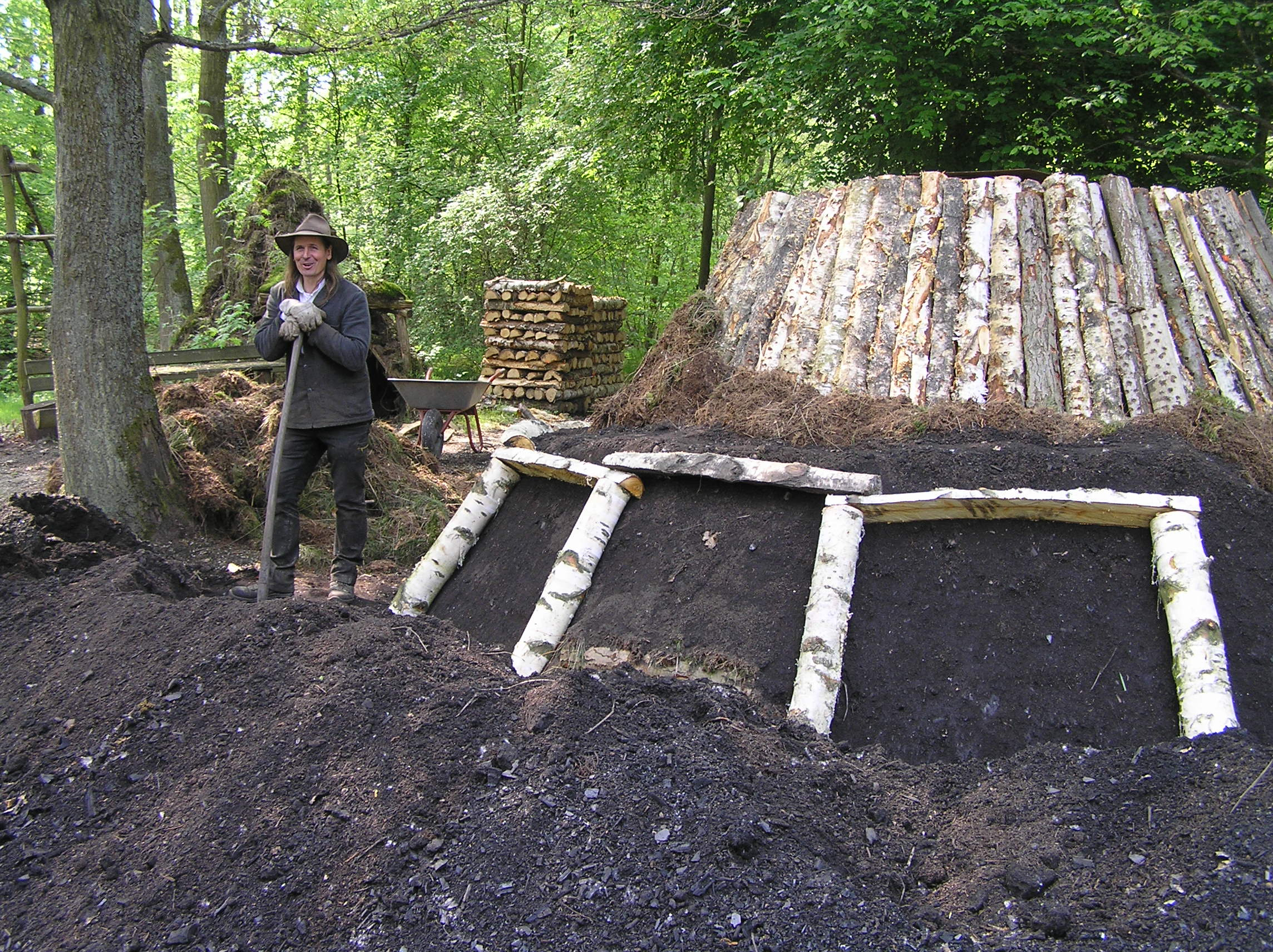 Köhler bei der Vorführung des Prozesses der Holzkohleherstellung im Hessenpark, Neu-Anspach, Deutschland